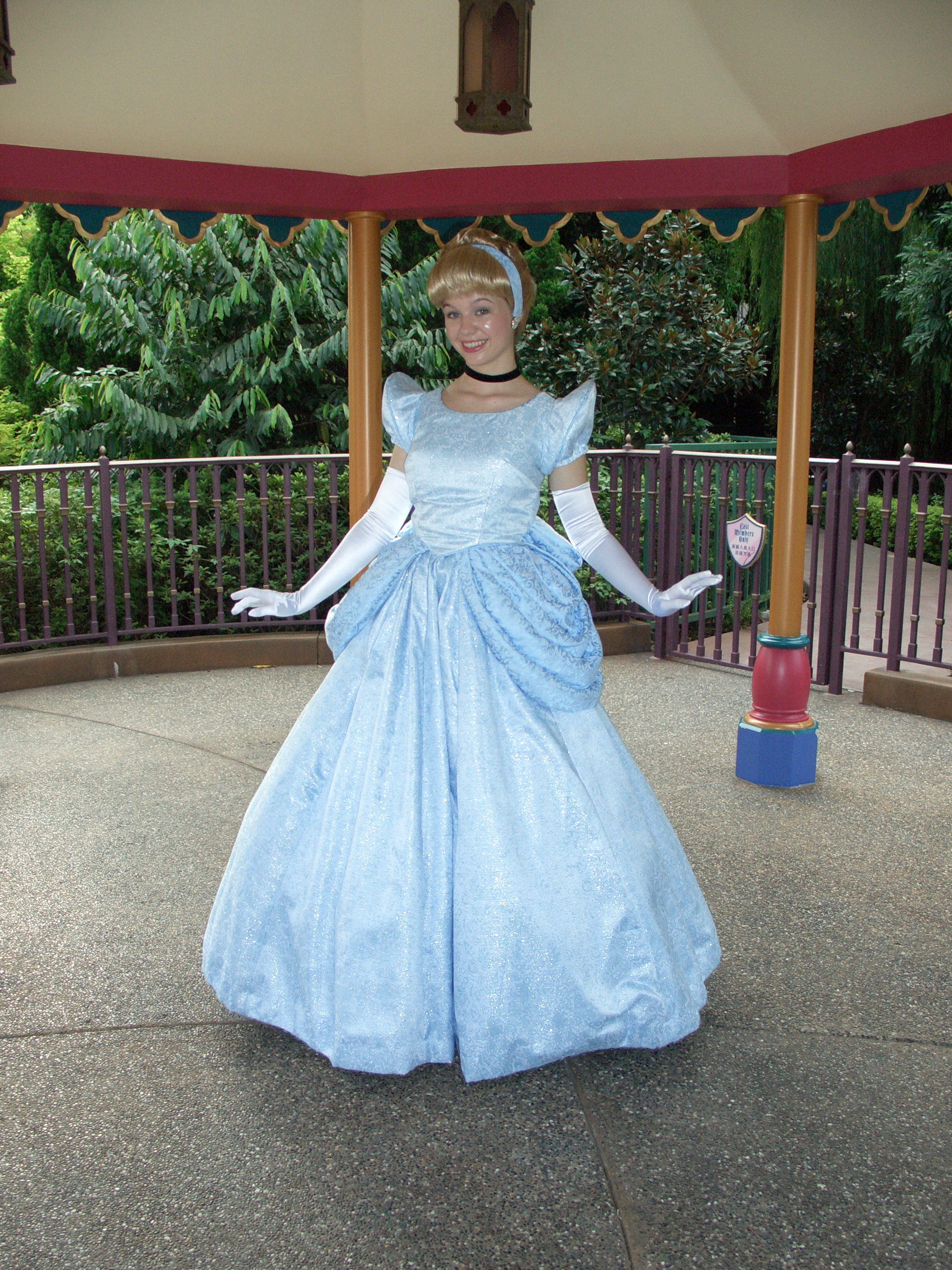 灰姑娘